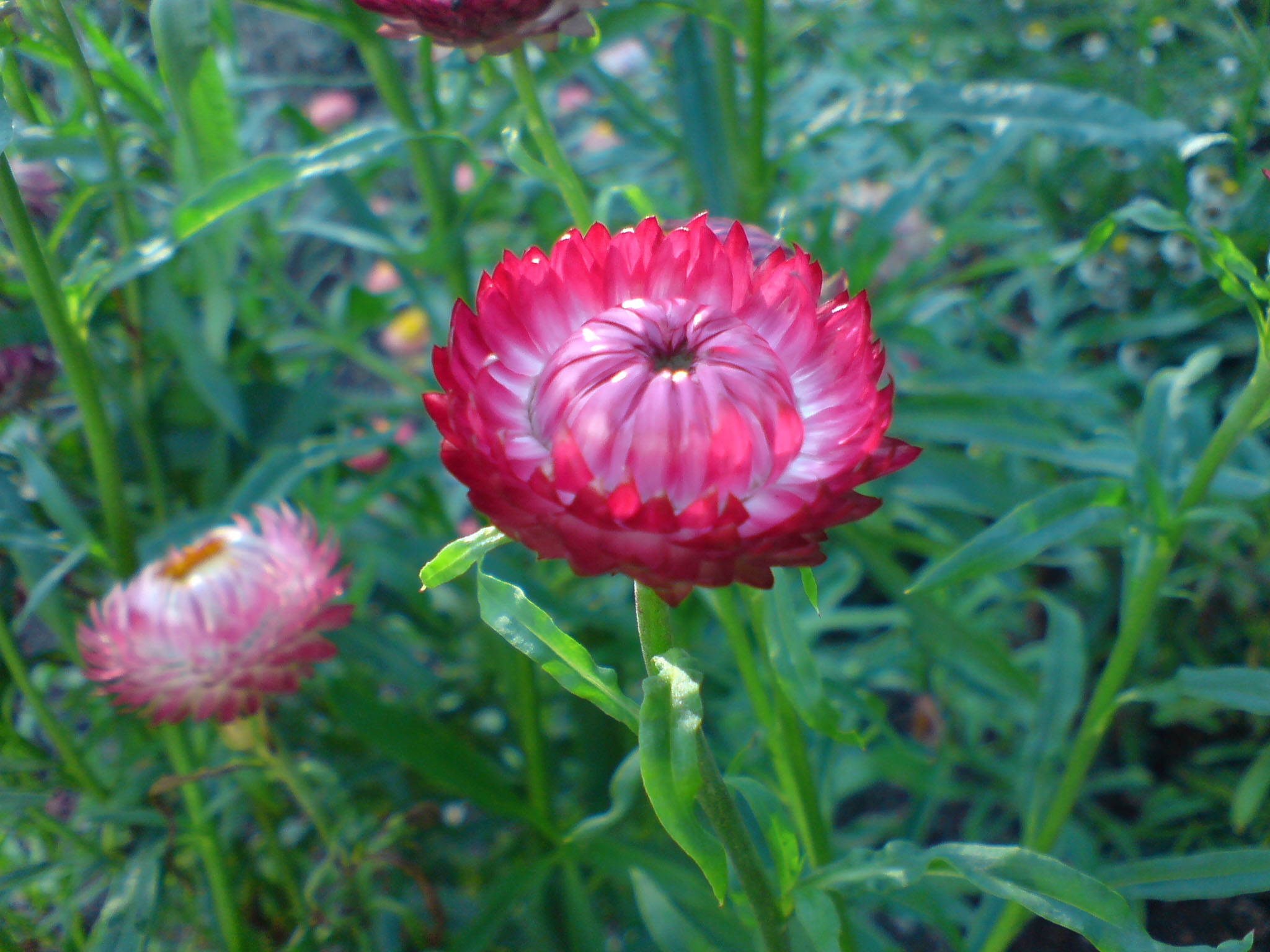 Helichrysum bracteatum (Garten-Strohblume) - Botanischer Garten Leipzig